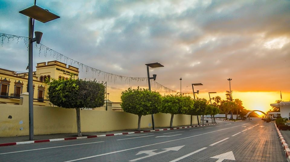 Calle en Alhucemas